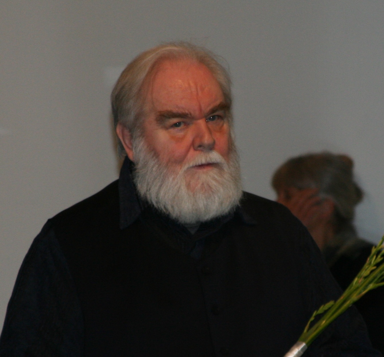 Raul Meel oma näituse avamisel Kumus